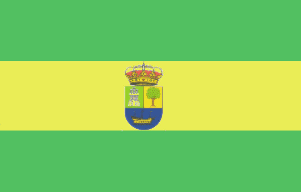 Bandera de Colindres (Cantabria, España)